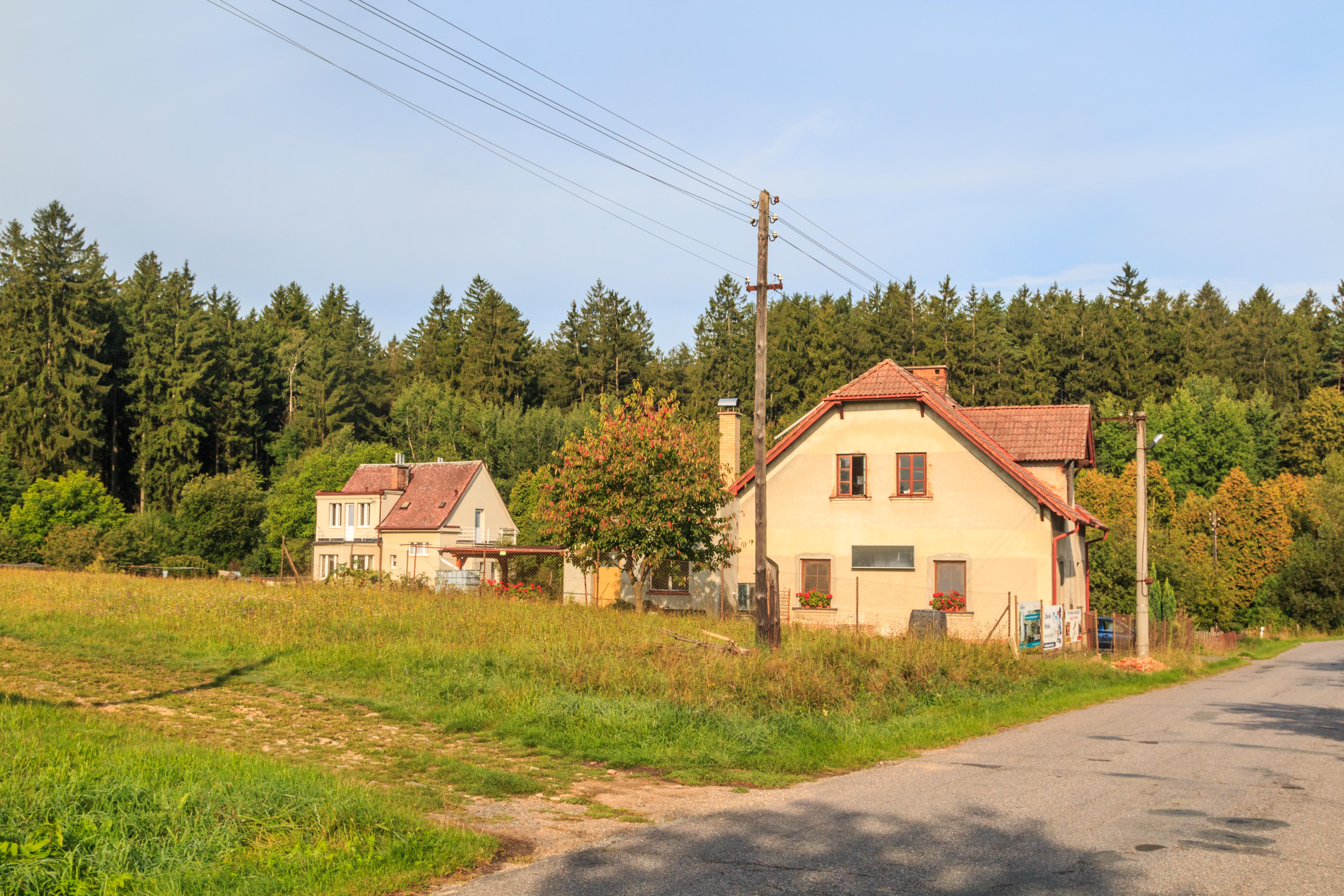 Malý Přívrat - dům čp. 105